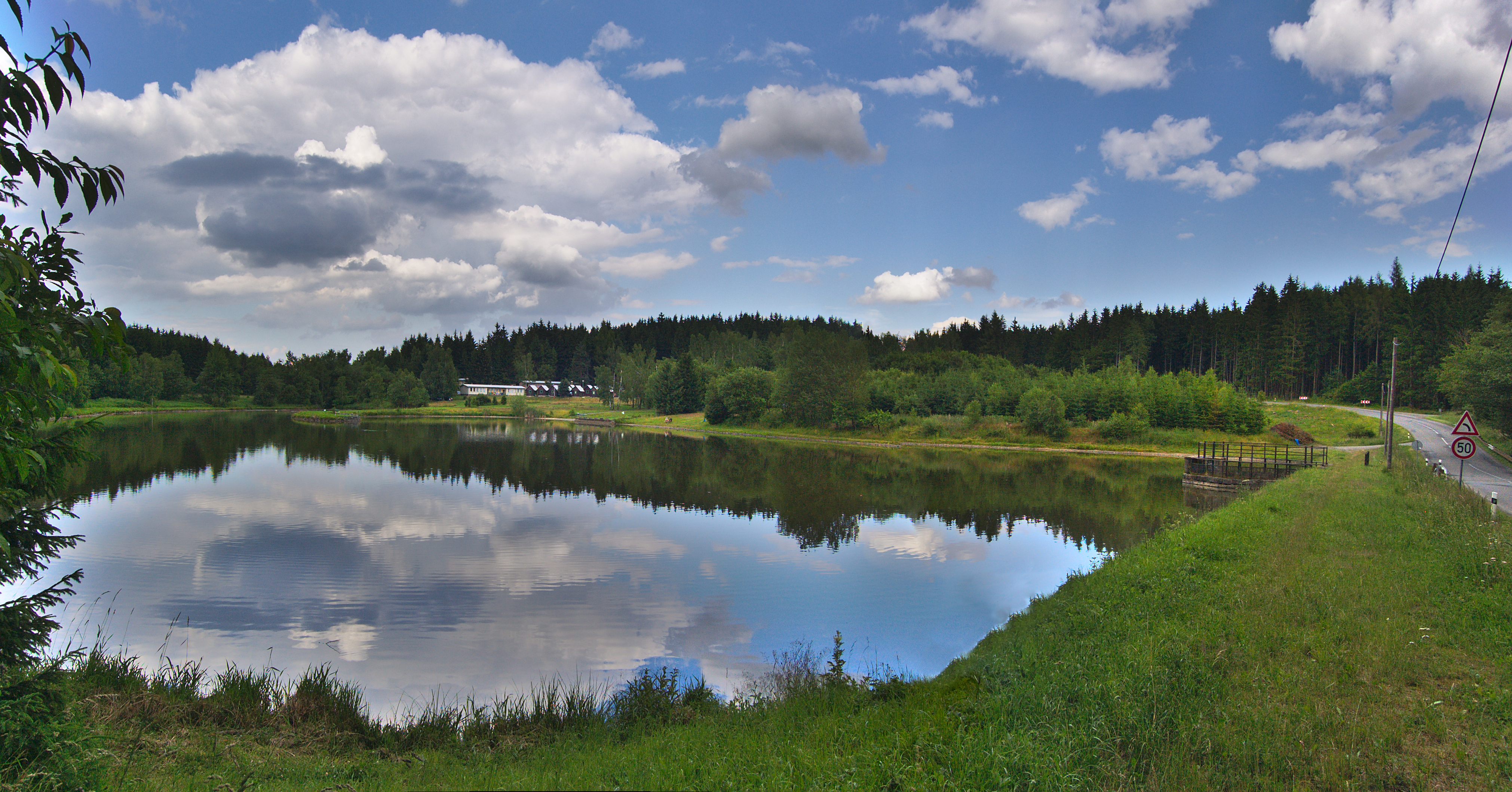 Protivanovský rybník - u hlavní silnice na Žďárnou, okres Prostějov